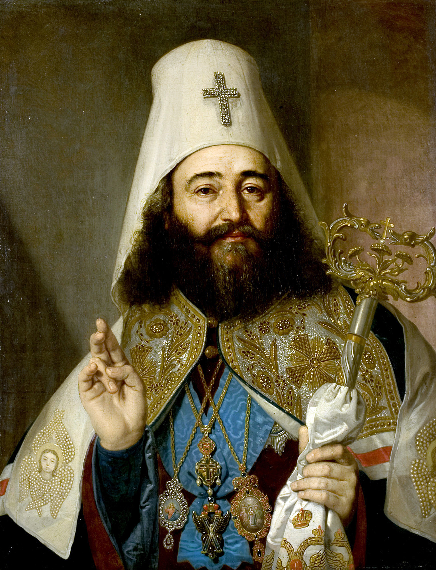 Католико́с Анто́ний II (груз. ანტონ II; Теймураз Багратиони, греч. თეიმურაზ ბაგრატიონი; 8 января 1762, Тбилиси — 21 декабря 1827, Нижний Новгород) — последний, перед упразднением автокефалии Грузинской Церкви, Католикос-ПатриархВосточной Грузии (1788—1811). Царевич, сын царя Картли-Кахети Ираклия II Багратиони, брат последнего царя Картли-КахетиГеоргия XII.